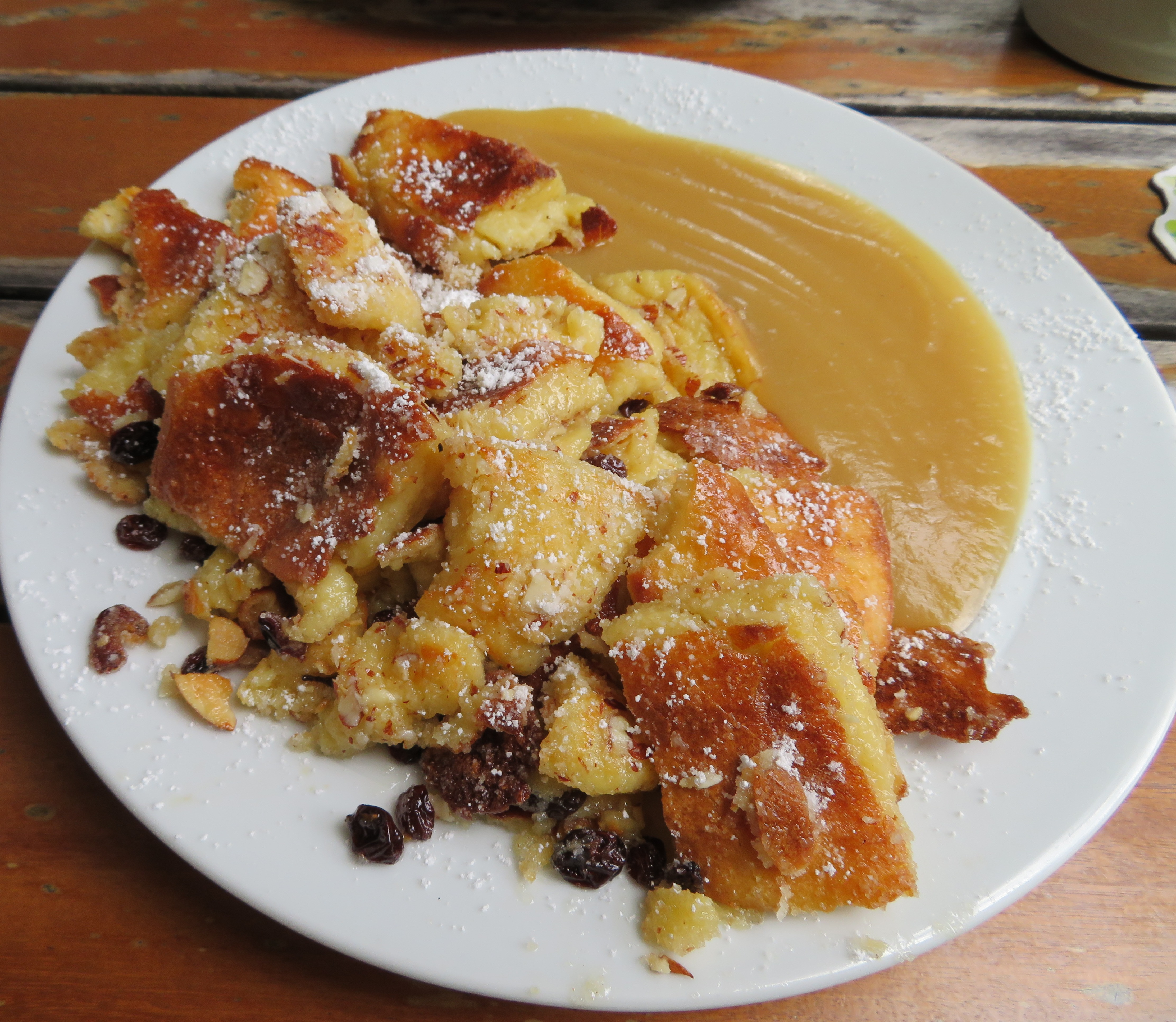 Kaiserschmarrn